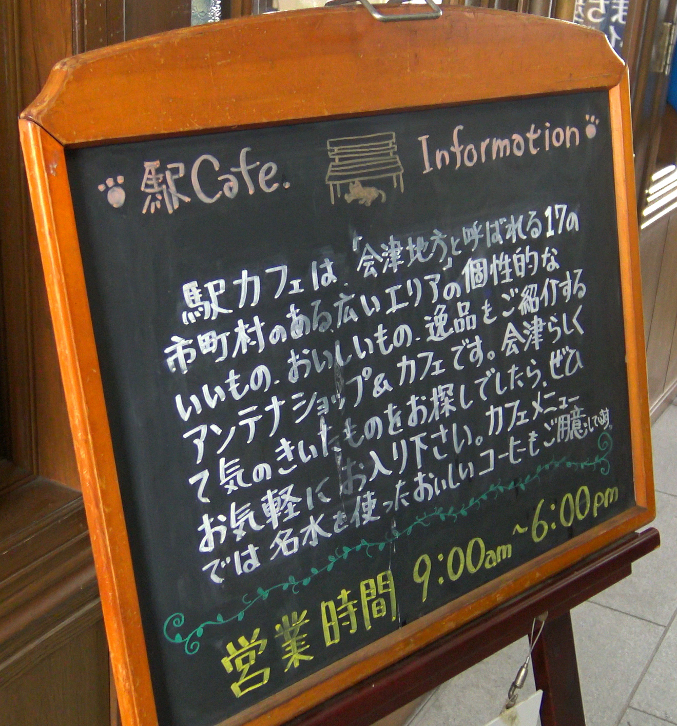 七日町駅 「駅Cafe.」 サインボード（2015年2月25日）